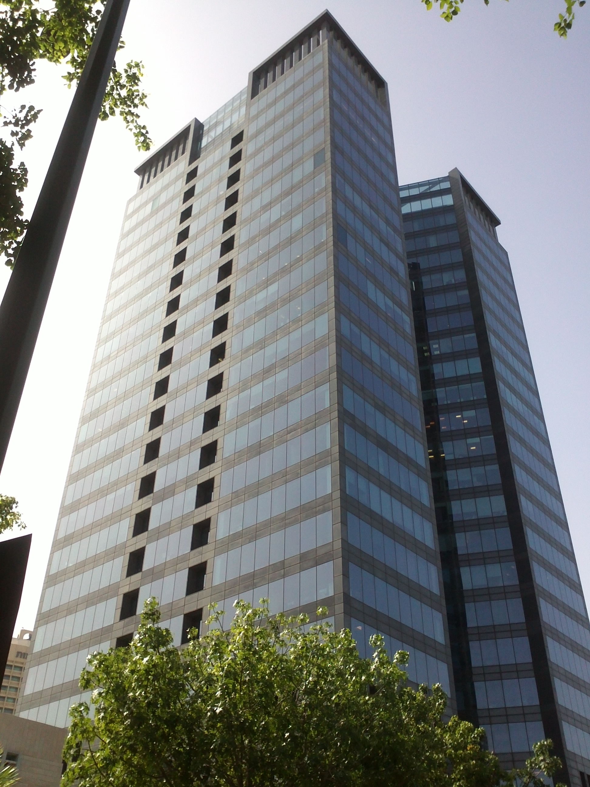 Тель-Авив, май 2013